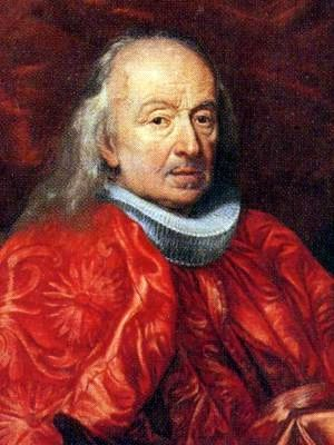 Ritratto del doge Oberto Della Torre